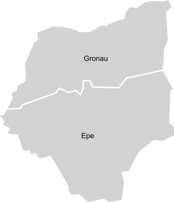 Gronau Ortsteile